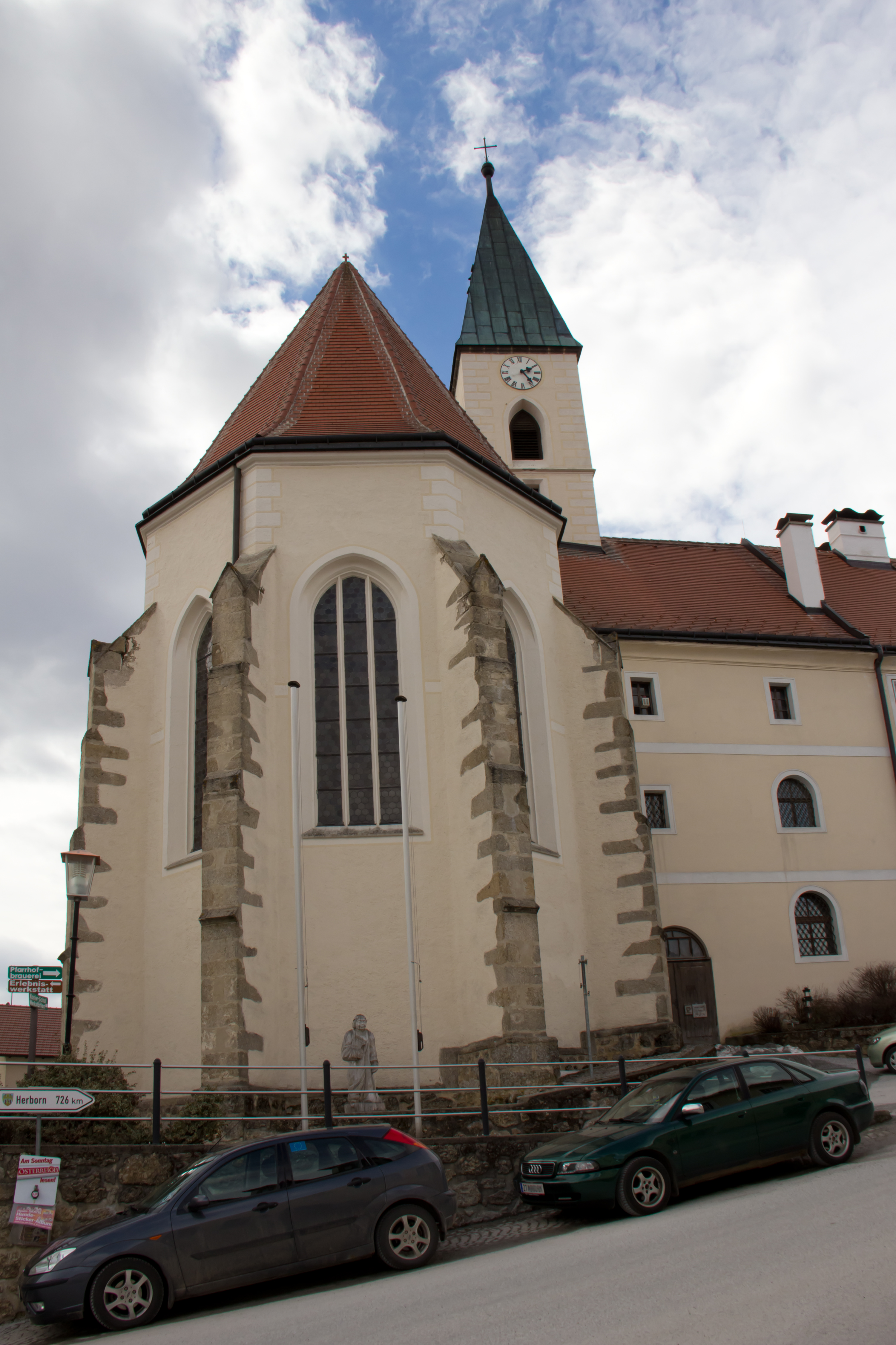 Spätgotische Hallenkirche, erbaut ab 1450.